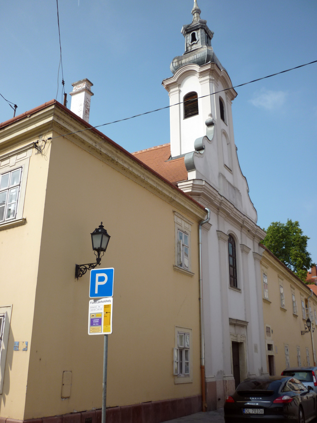 Német ispita (Győr, Vörösmarty Mihály utca 6., Apáca utca 27-31.) This is a photo of a monument in Hungary. Identifier: 4408